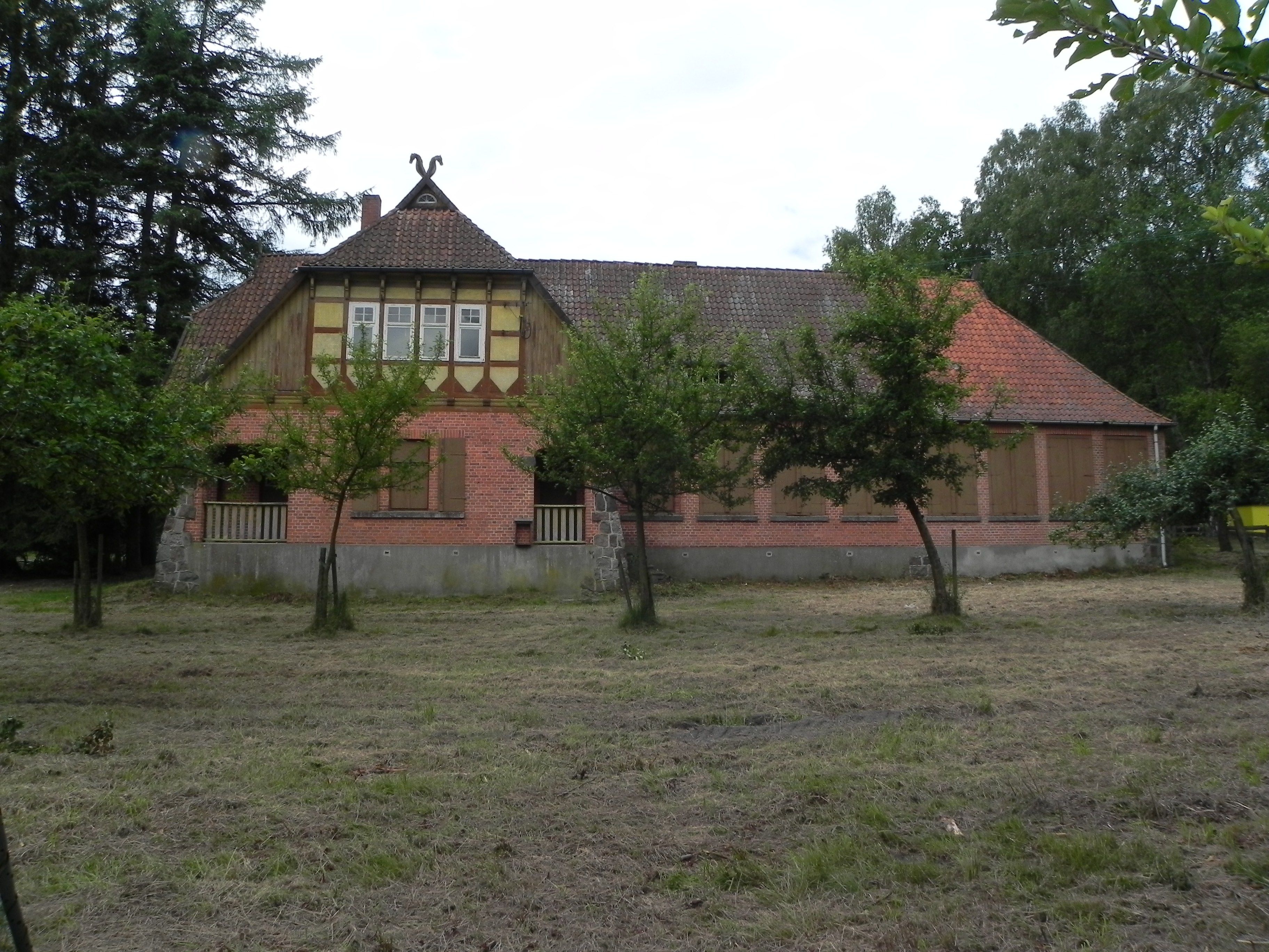 Ehemalige Schule in Lopau, Lüneburger Heide, Germany.